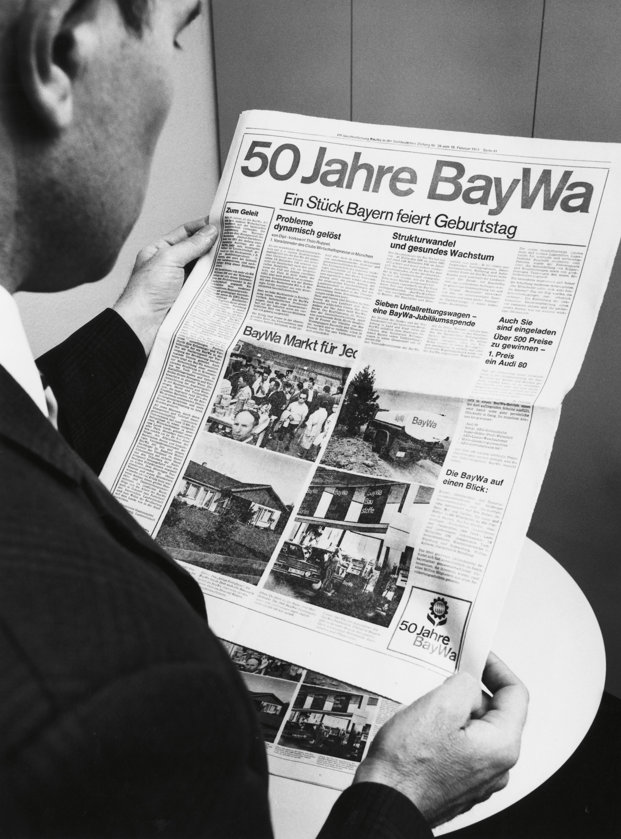 Jubiläumszeitung zum 50jährigen Bestehen der BayWa